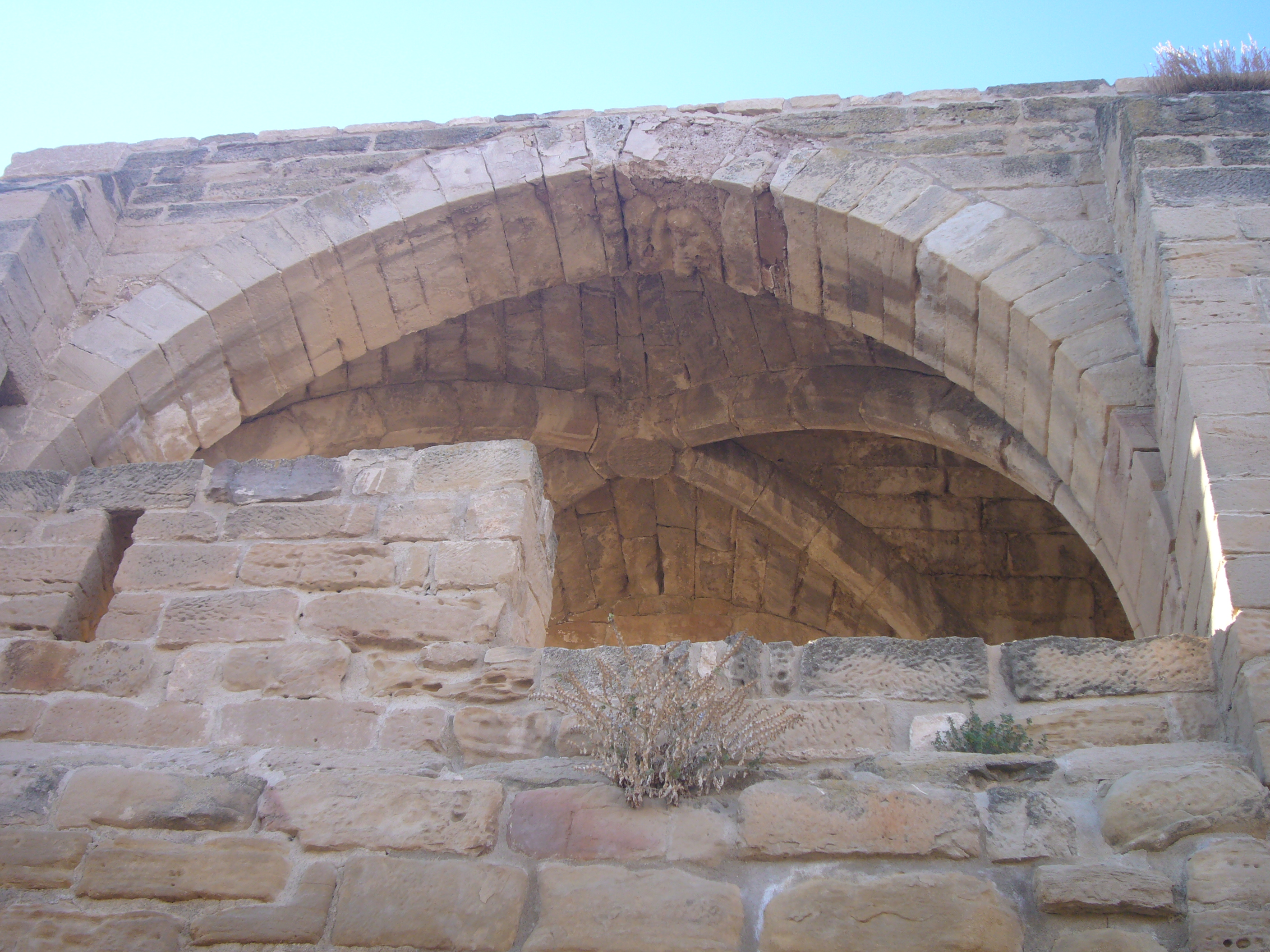 Castell de l'Albi. Darrera la porta d'entrada hi ha una volta de motllures encreuades, a la clau de la qual hi ha diversos escuts